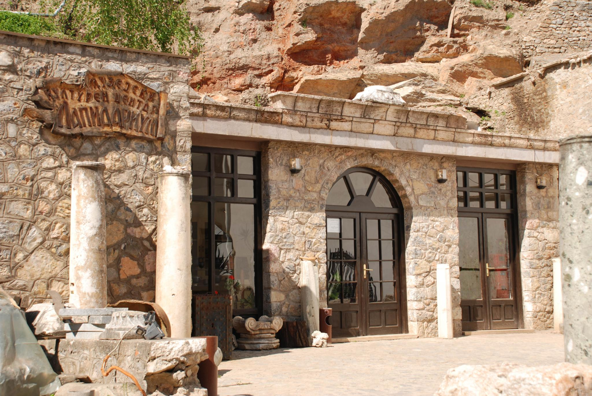 Ohrid Ohrid, Macedonia